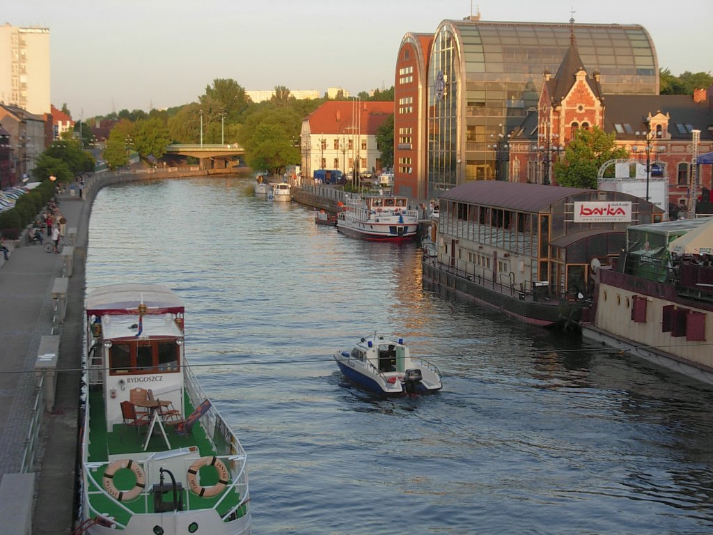 Stary Port w Bydgoszczy